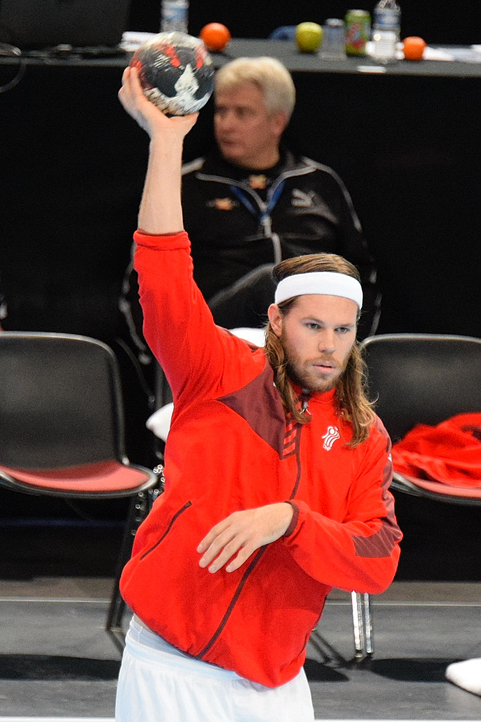 Le 10 janvier 2016 lors du match France / Danemark durant la Golden League à l'AccorHotels Arena (Paris).